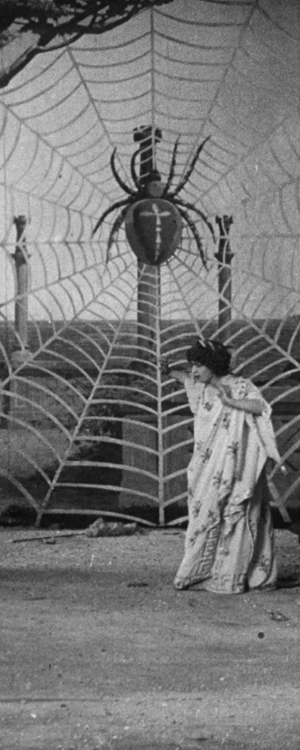 Photogramme de la La Légende de la fileuse, film de Louis Feuillade